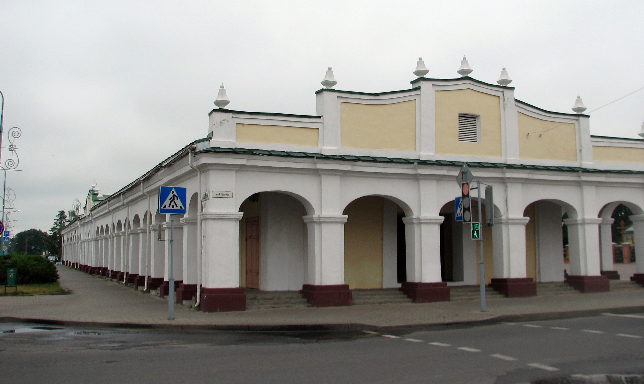 Беларуская (тарашкевіца): Белыя лаўкі (Пружаны). Выгляд з рогу вул. Кобрынскай і Р. Шырмы